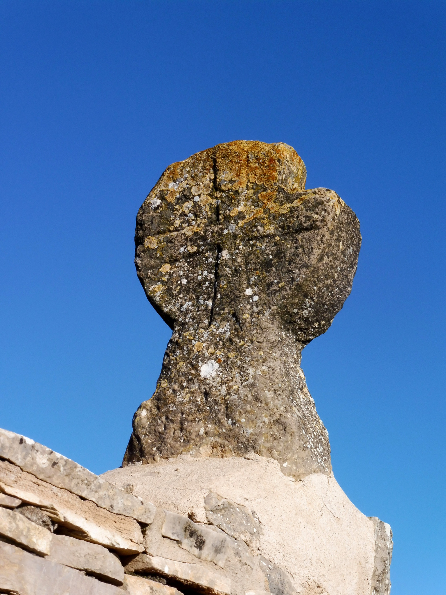 Cementiri de Cabestany (Montoliu de Segarra): estela discoïdal